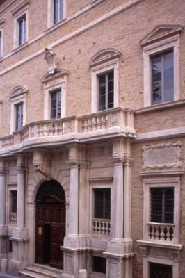 Macerata